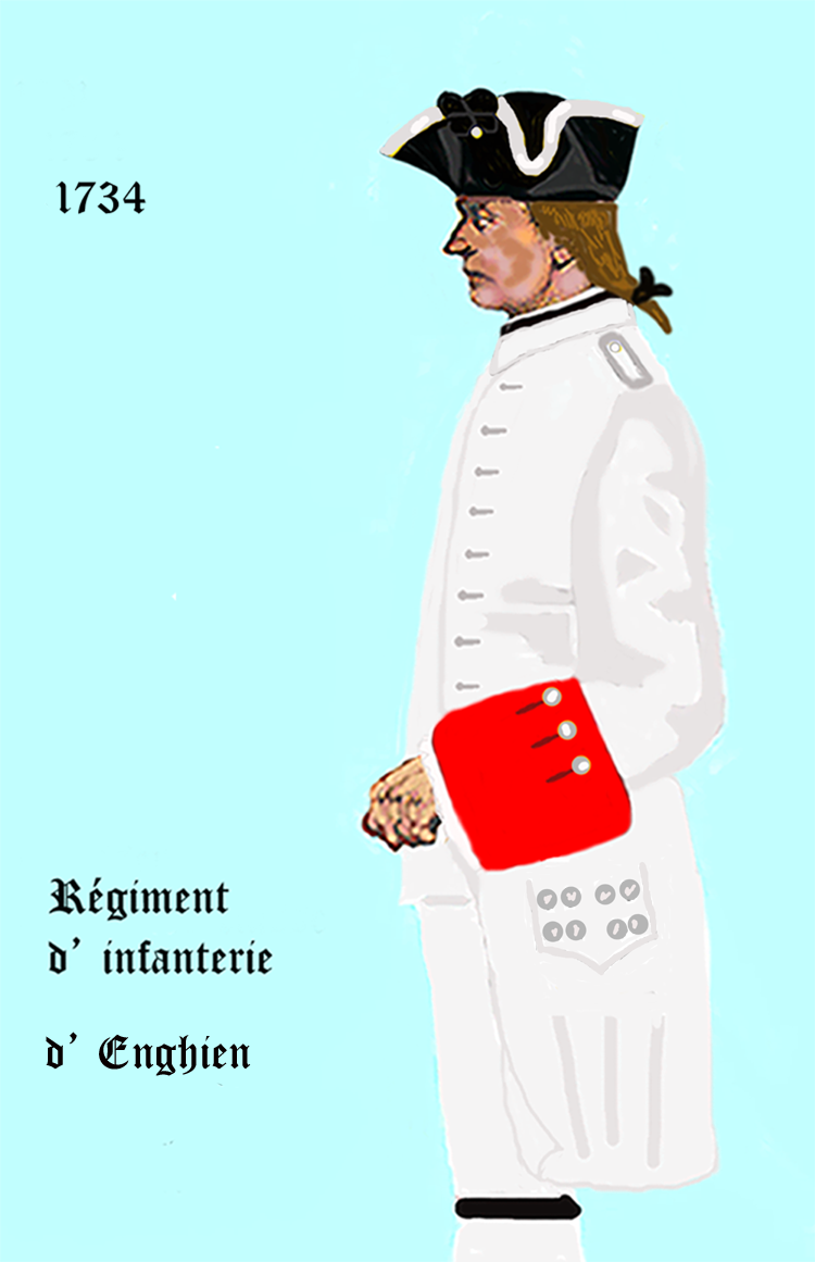 Uniform eines königlich französischen Infanterie-Regiments gemäß Dekret von 1734. - Entnommen und überarbeitet aus: „LES UNIFORMES ET LES DRAPEAUX DE L'ARMÉE DU ROI“ Marseille 1899.